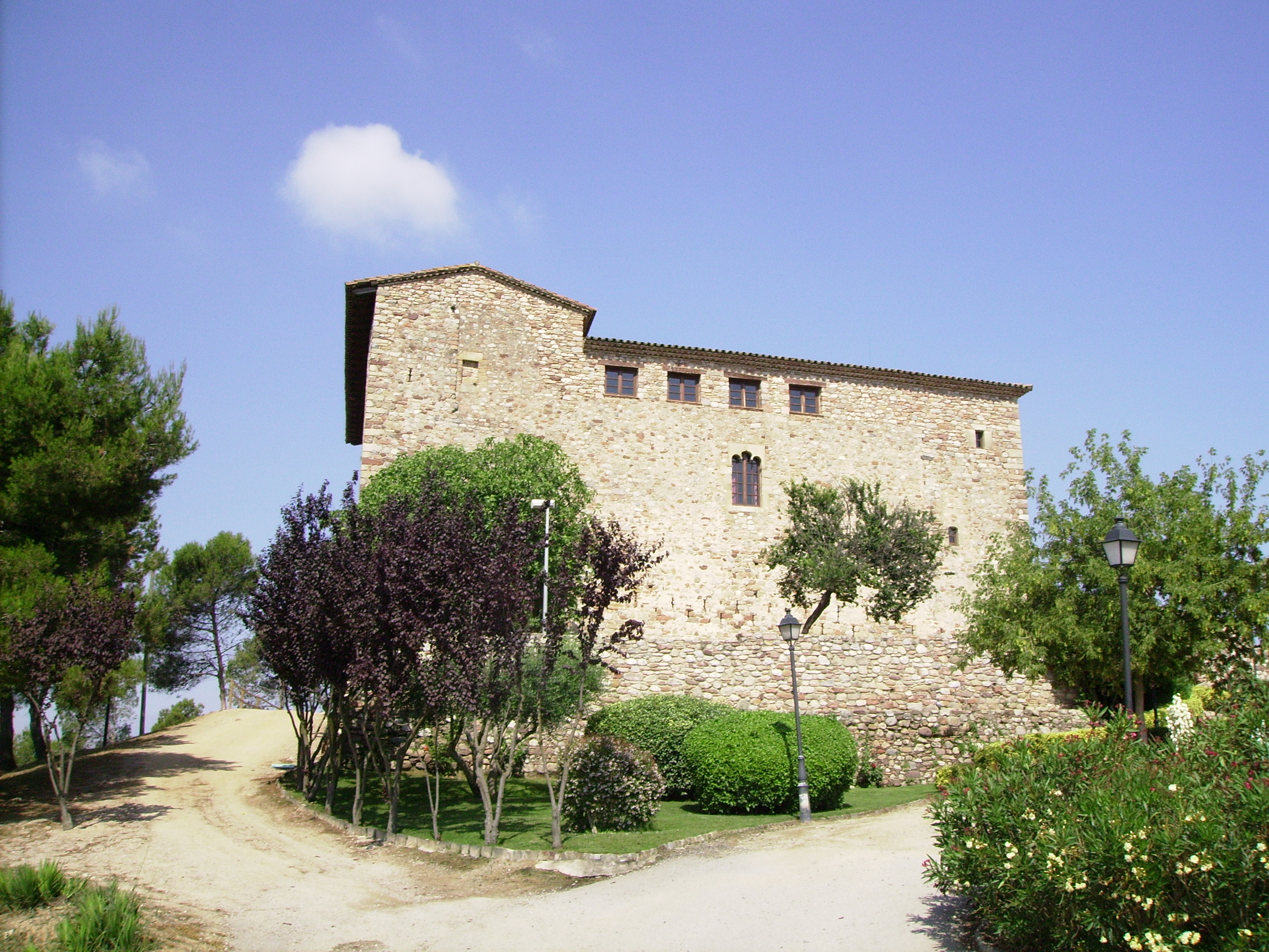 Cara de llevant del castell de Plegamans